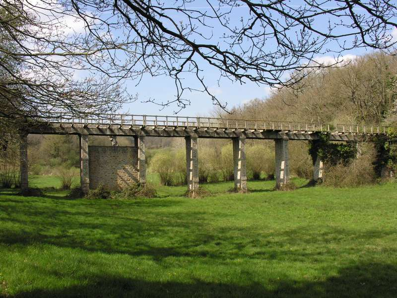 Passerelles du Gouray construites pour les Chemins de Fer des Côtes-du-Nord